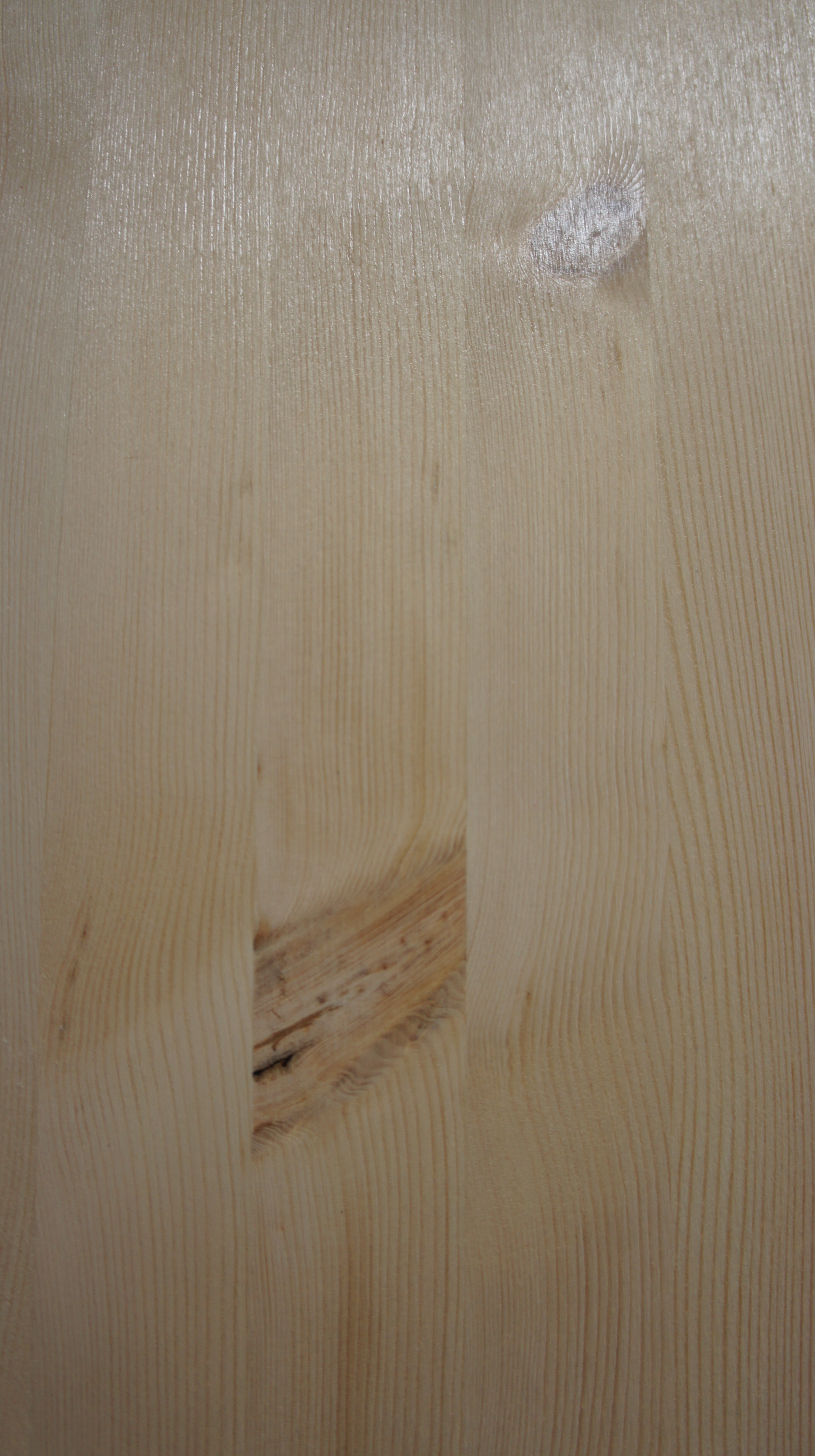 Покрытый лаком мебельный щит из хвои